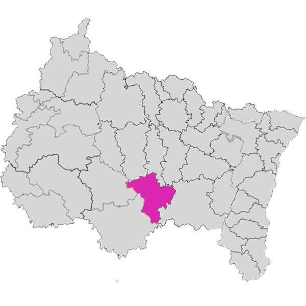 localisation dans la région ACAL